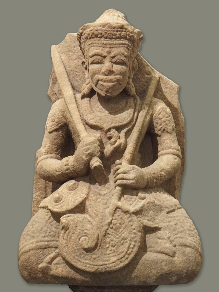 Shiva XIVè-XVè siècle grès Vietnam, Kon Tum, province de Kon Tum Style de Yang Mum Envoi de l'école française d'extrême-orient, 1936 Le musée national des arts asiatiques - Guimet Voir l'album sur le musée cham de Da Nang (Vietnam) (photos dalbera)